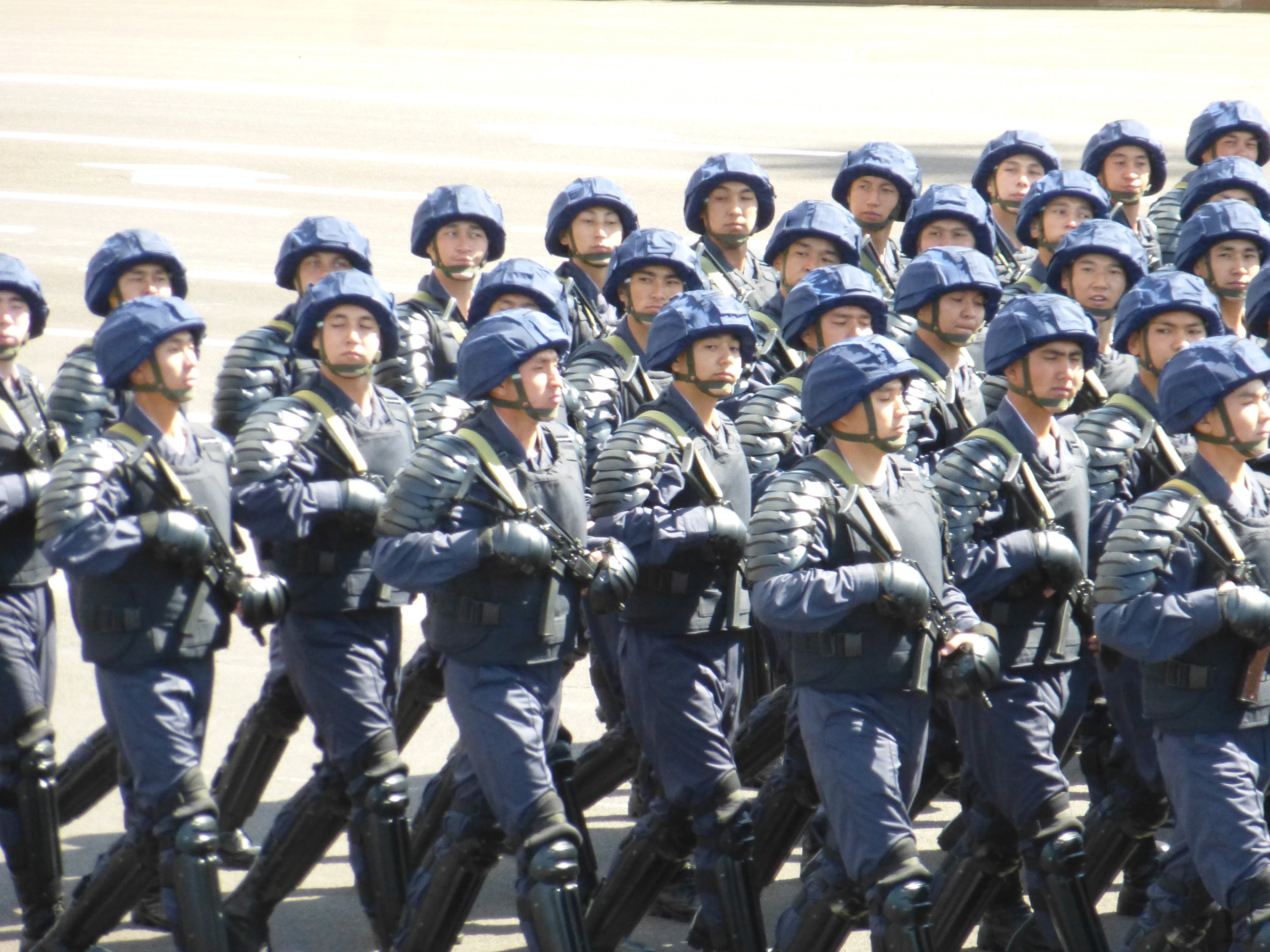 Бойцы НацГвардии Казахстана с ПП-19-01. Астана. 7 мая 2017 года